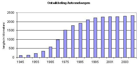 bron: Adviesdienst Verkeer en vervoer